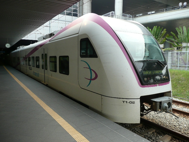 KLIAtransit at KLIA